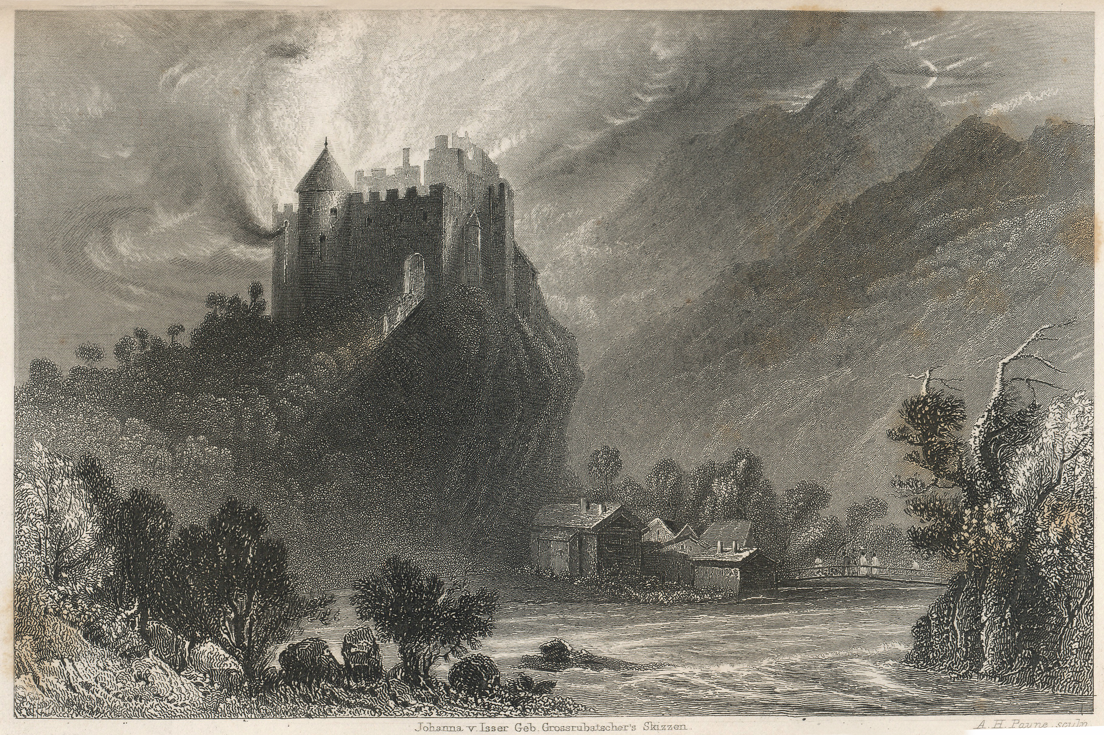 View of Kastelbell